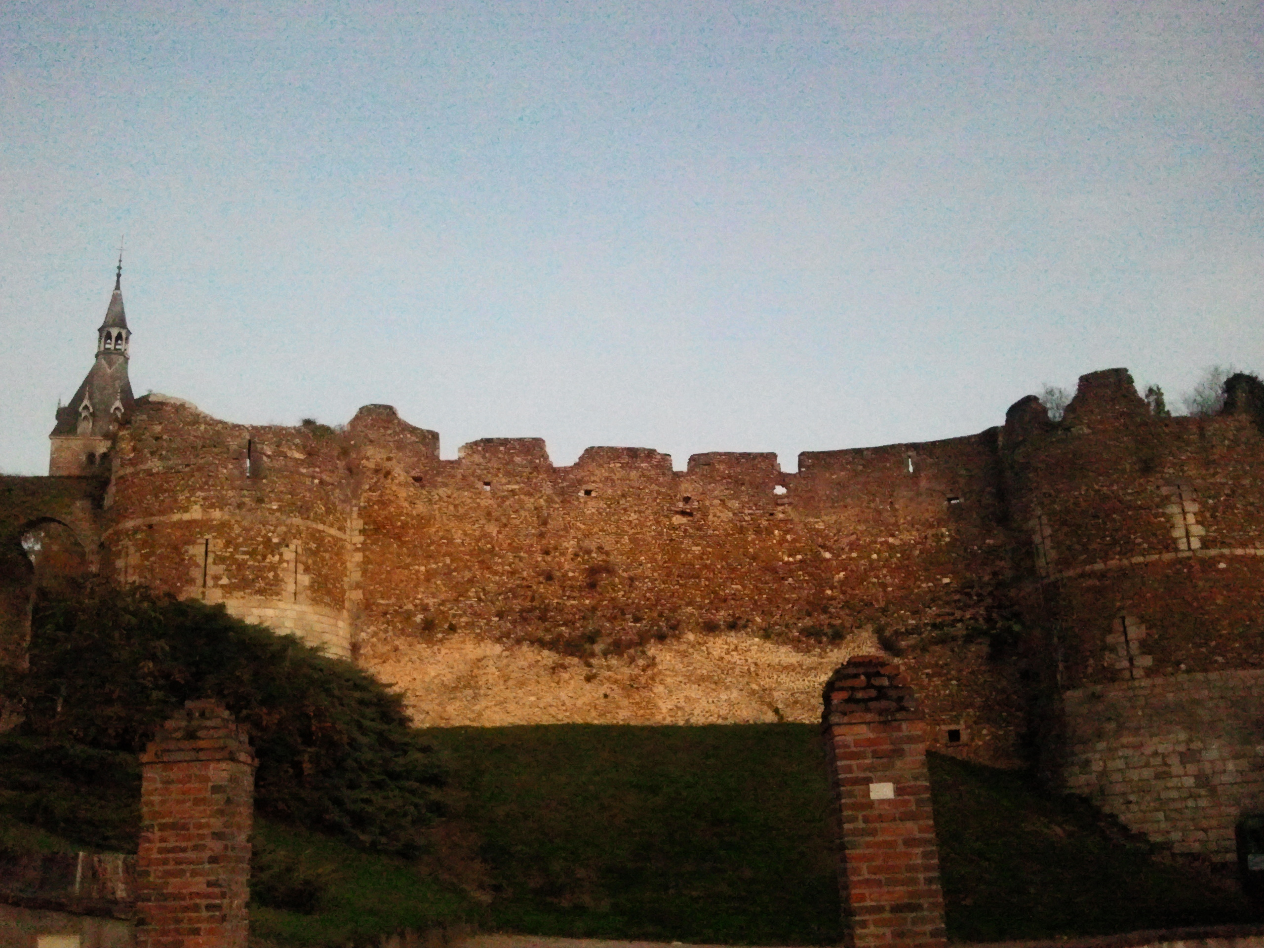 Ruines rempart de l'ancien Chateau